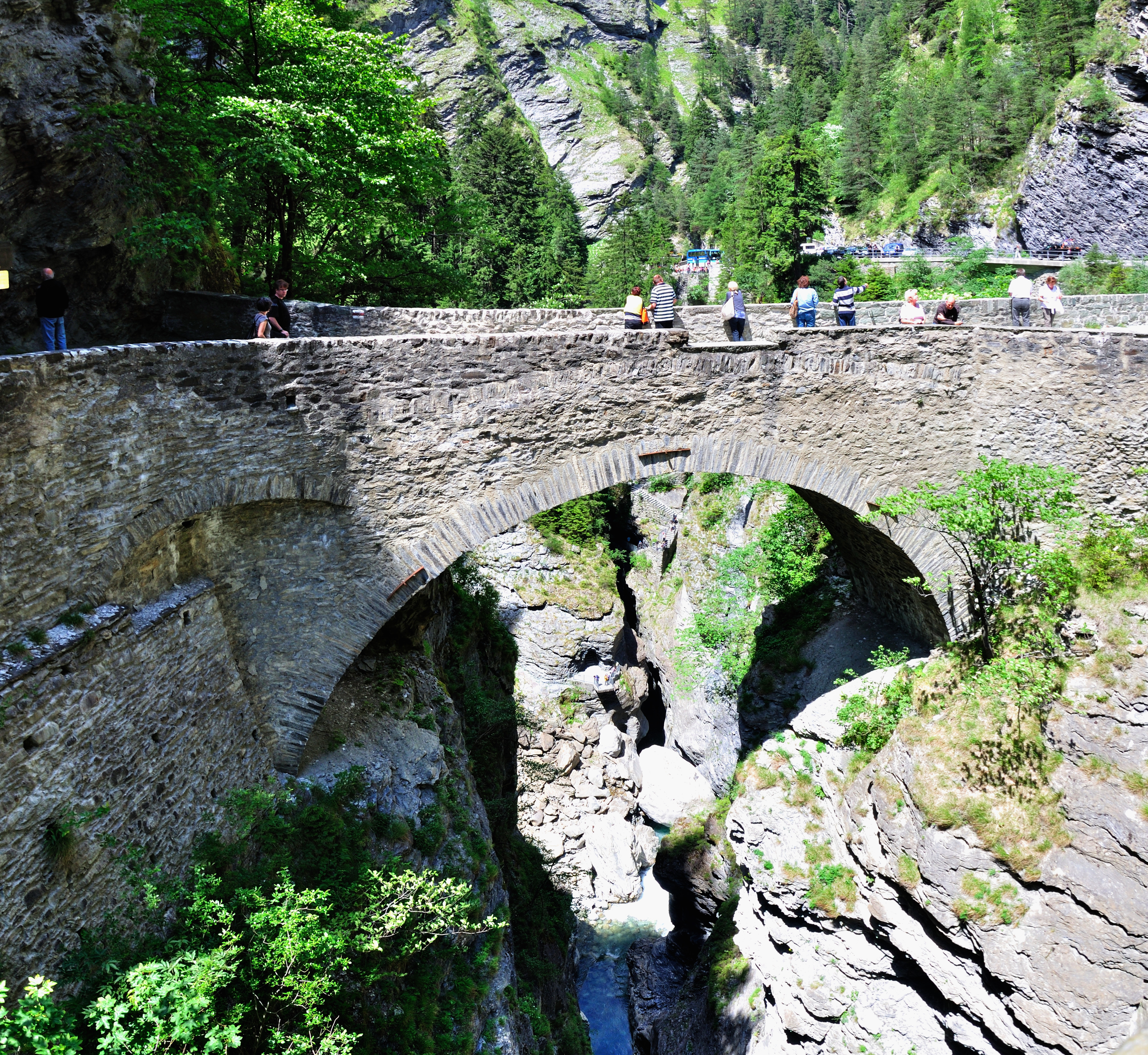 Switzerland, Graubünden, Via Mala